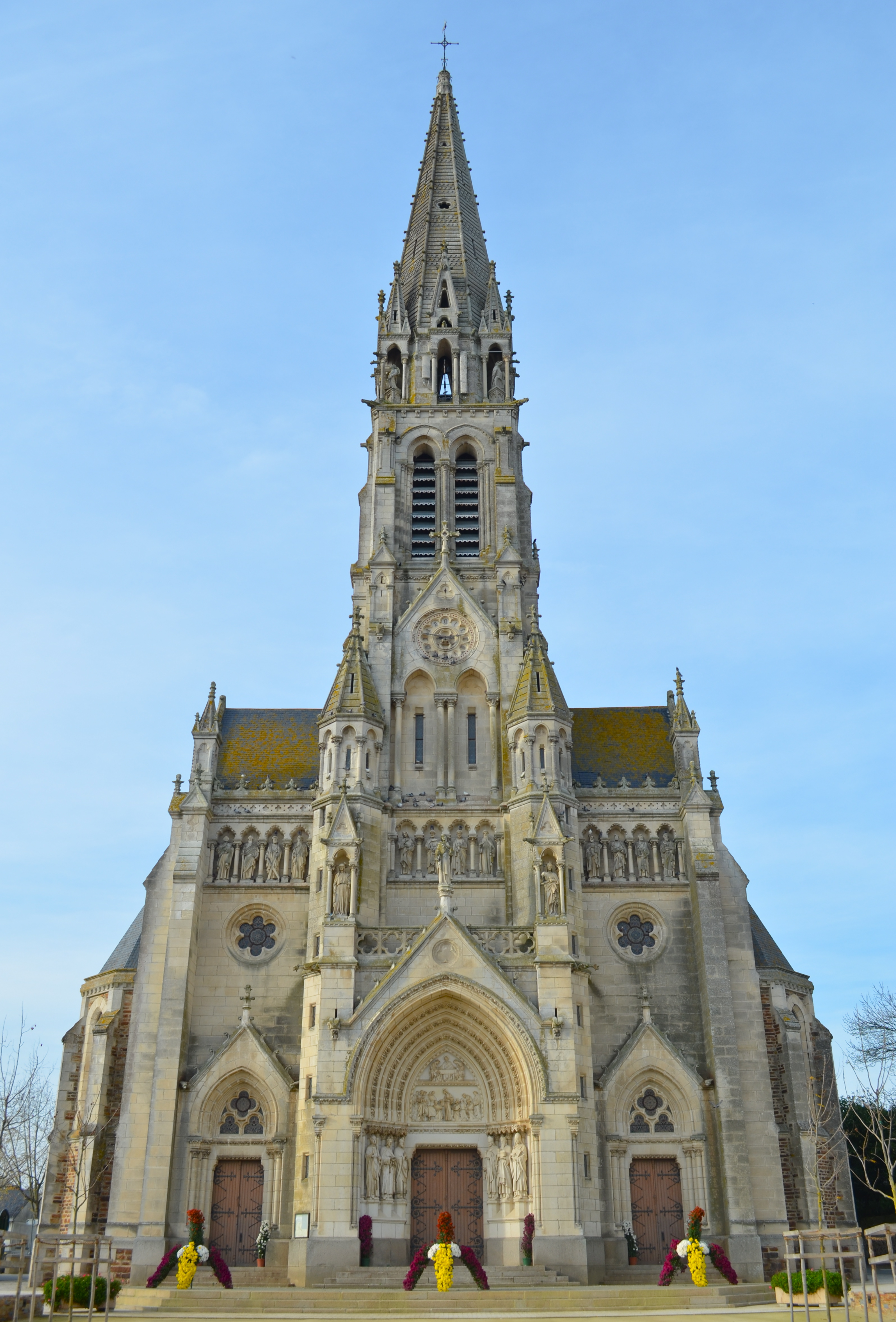 Église Notre-Dame - Sainte-Pazanne (Loire-Atlantique)